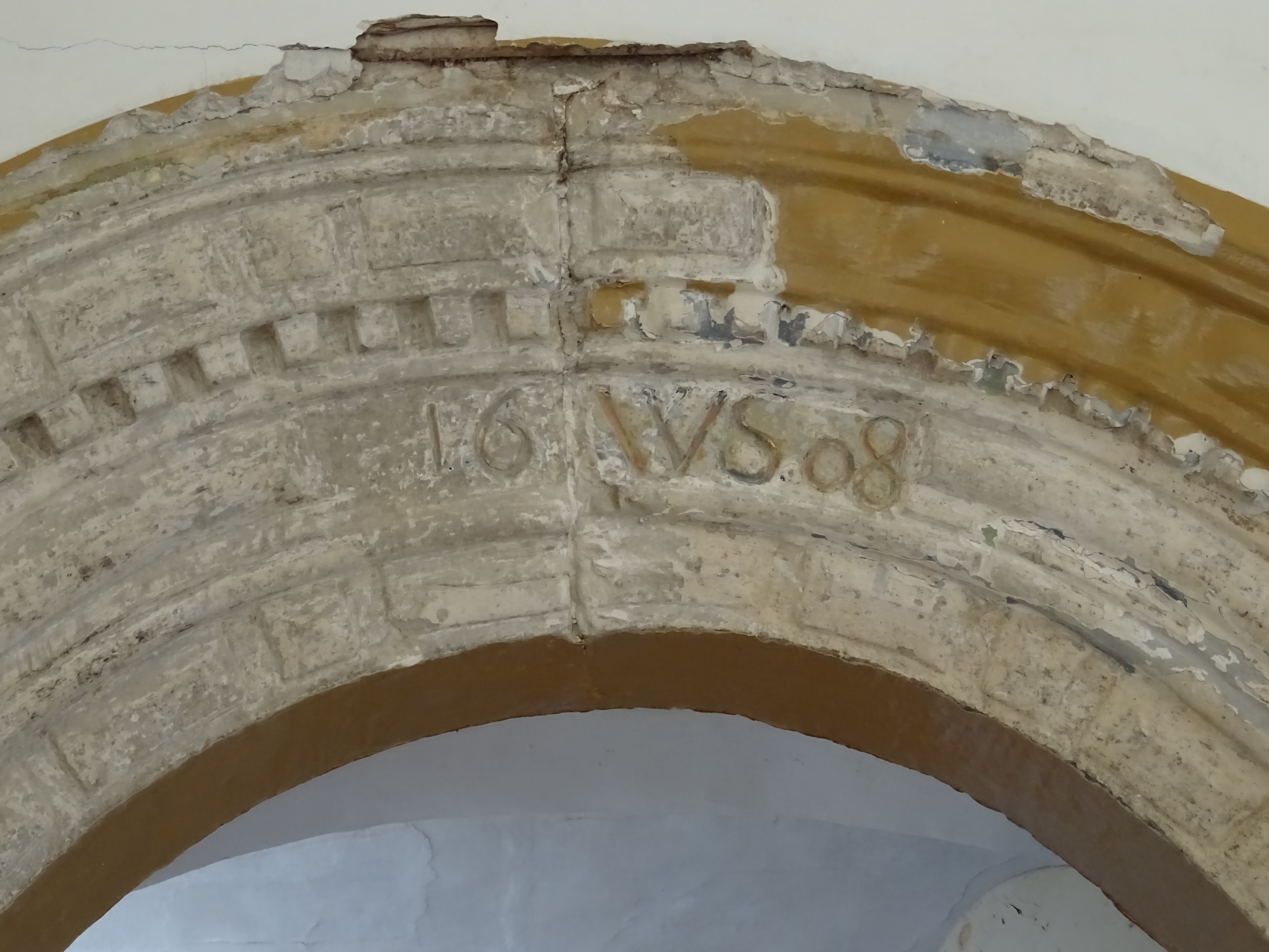 Schloss Naundorf bei Dippoldiswalde. Bogen über Erdgeschoßportal mit den Initialen von Wilhelm von Schönberg 1608